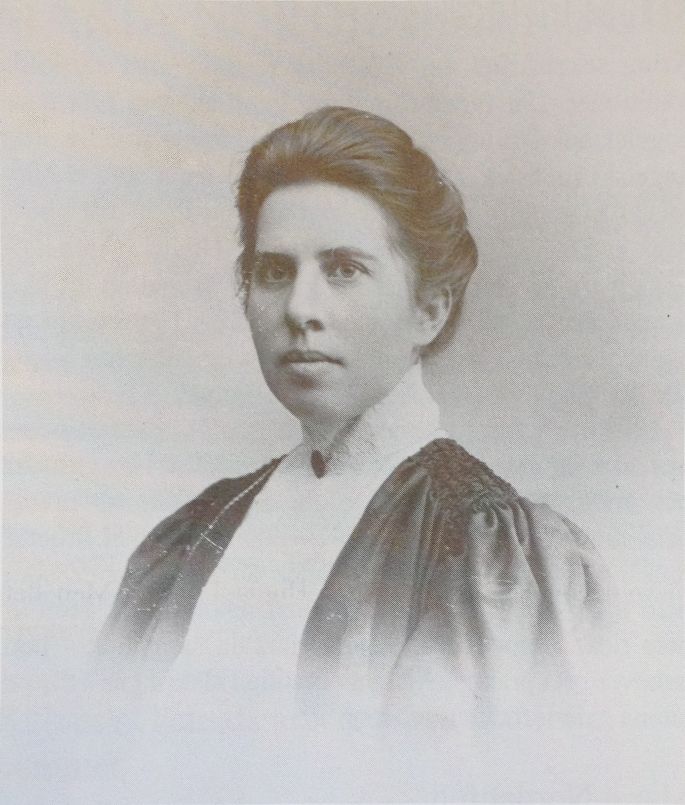 Maria Nordenfelt, 1890-tal.